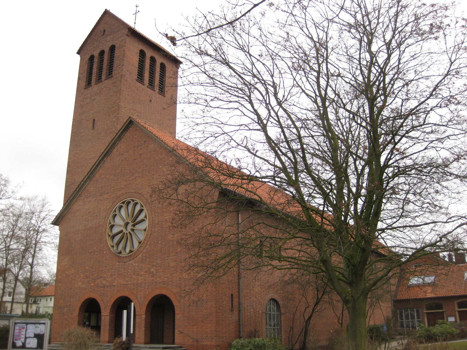 Die römisch-katholische Kirche Heilig Geist im Stadtteil Sonnenhügel in Osnabrück